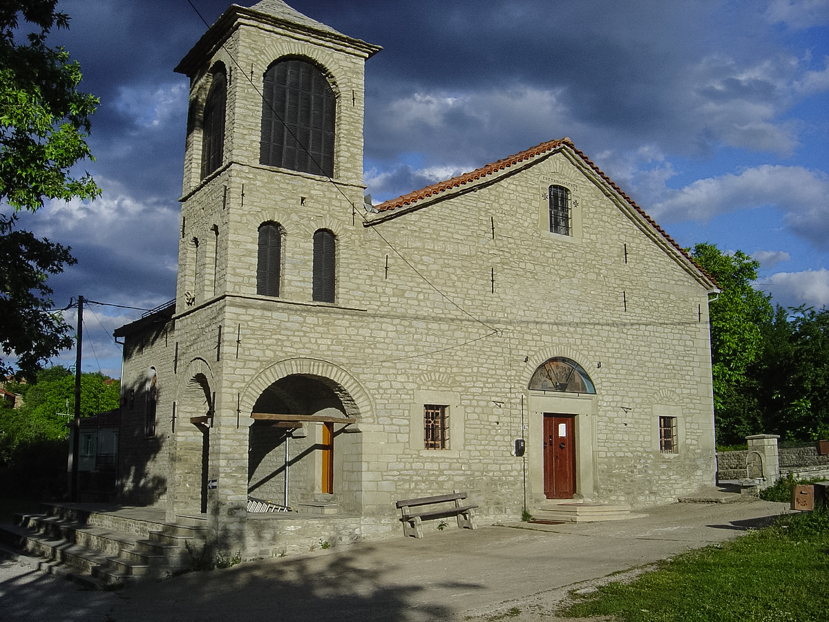 Η ενοριακή εκκλησία της Χρυσαυγής